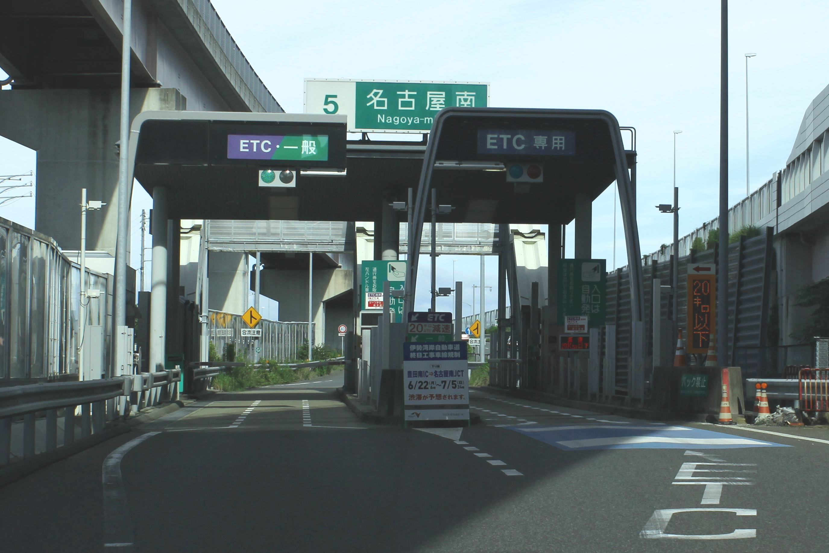 伊勢湾岸自動車道（第二東名）名古屋南インターチェンジトールゲート